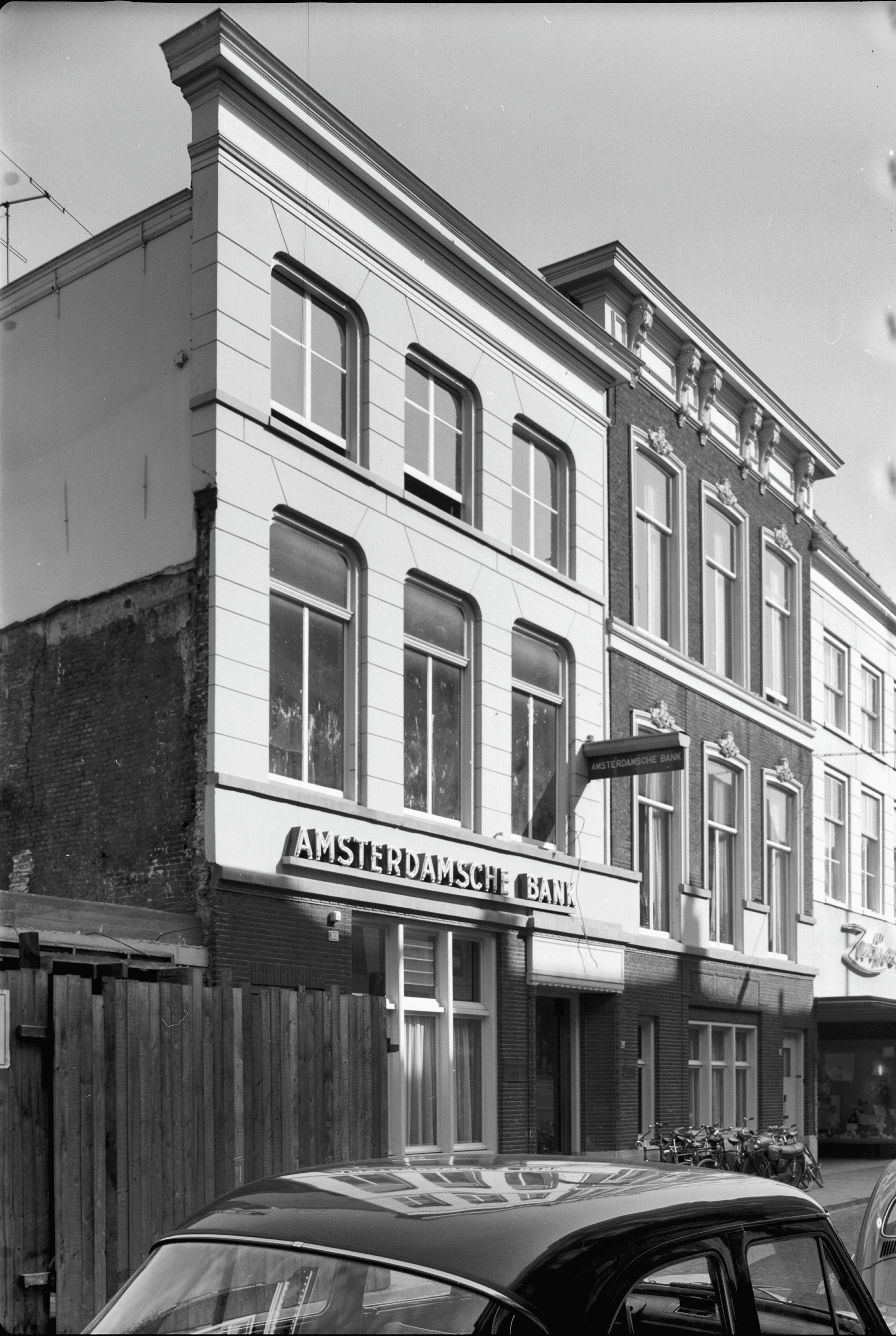 Gootklos: Panden met lijstgevels. Het linker pand heeft ramen met aan de bovenzijde afgeronde hoeken. In het pand is de Amsterdamsche Bank gevestigd. Het middelste pand heeft gootklossen en omlijstingen om de ramen.